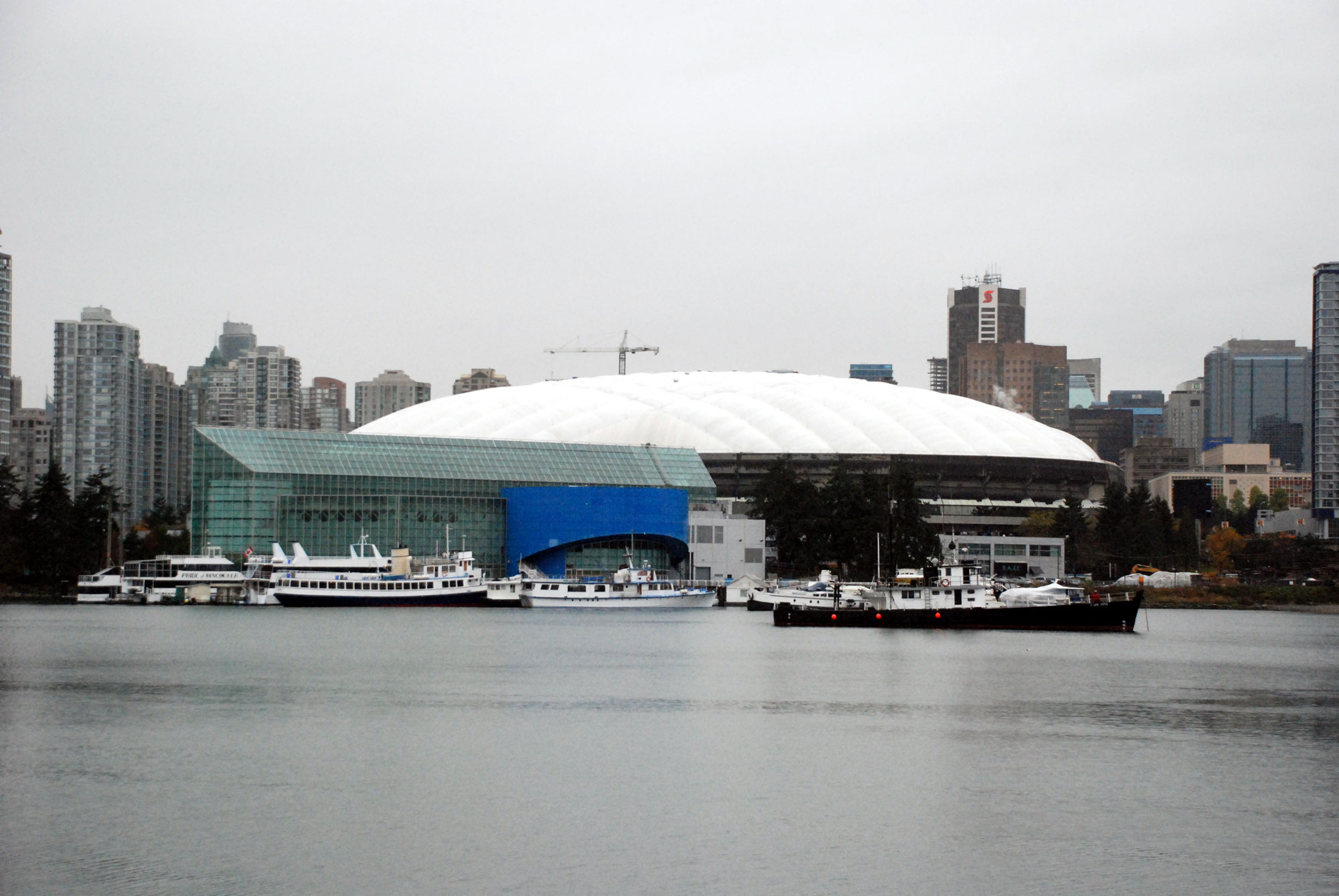 BC Place, Vancouver, BC